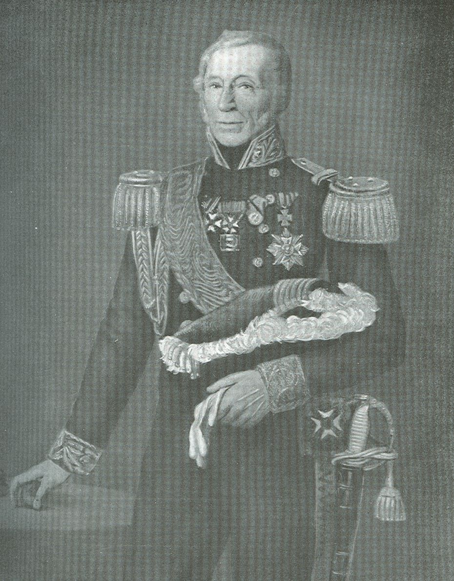 portret van Engelbertus Lucas